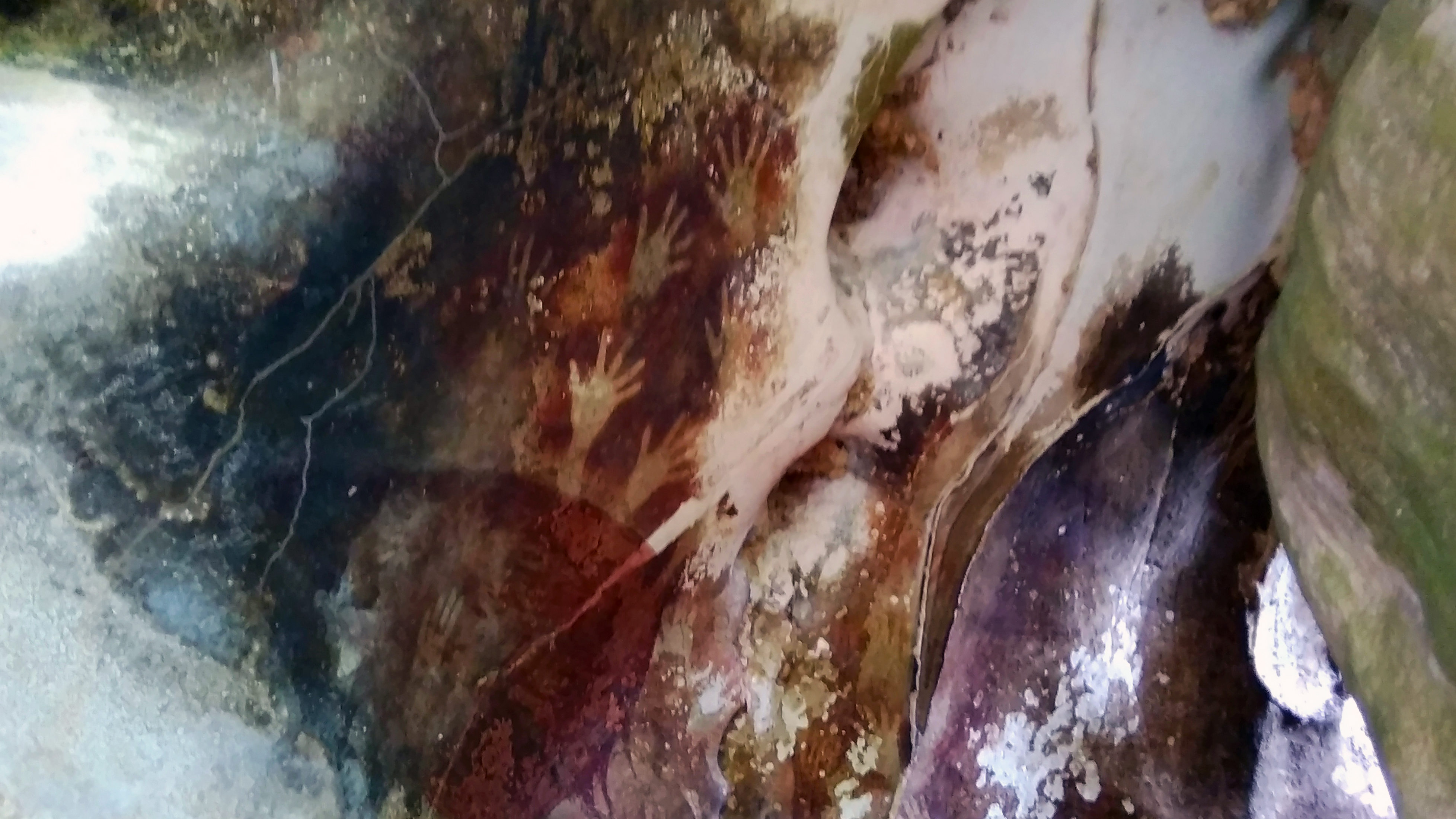 Lukisan tangan yang dibuat manusia purba di Gua Pettakere, Maros, Sulawesi Selatan. Belum bisa dipastikan usia dan bahan lukisan prasejarah ini. Menurut perkiraan, usianya mencapai 39.900 tahun dan dibuat dari bahan batu dan tanah.